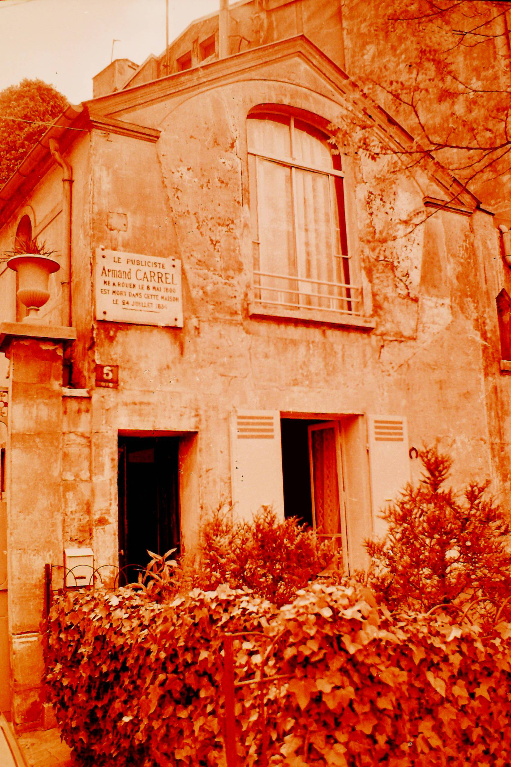 Il s'agit de l'ancien pavillon de chasse situé a Saint-Mandé et ou Armand Carrel a été transporté à la suite de son duel avec Emile de Girardin